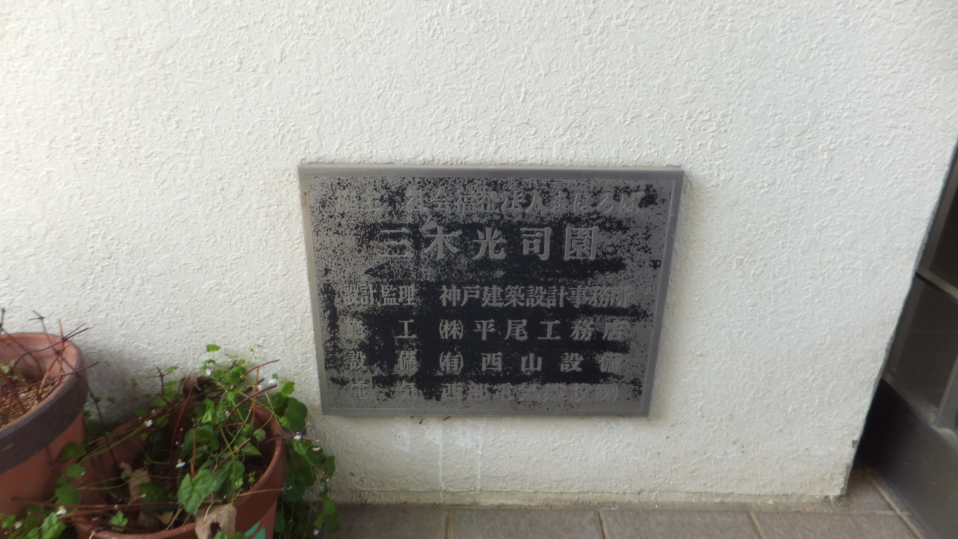 三木光司園（2014年5月18日）